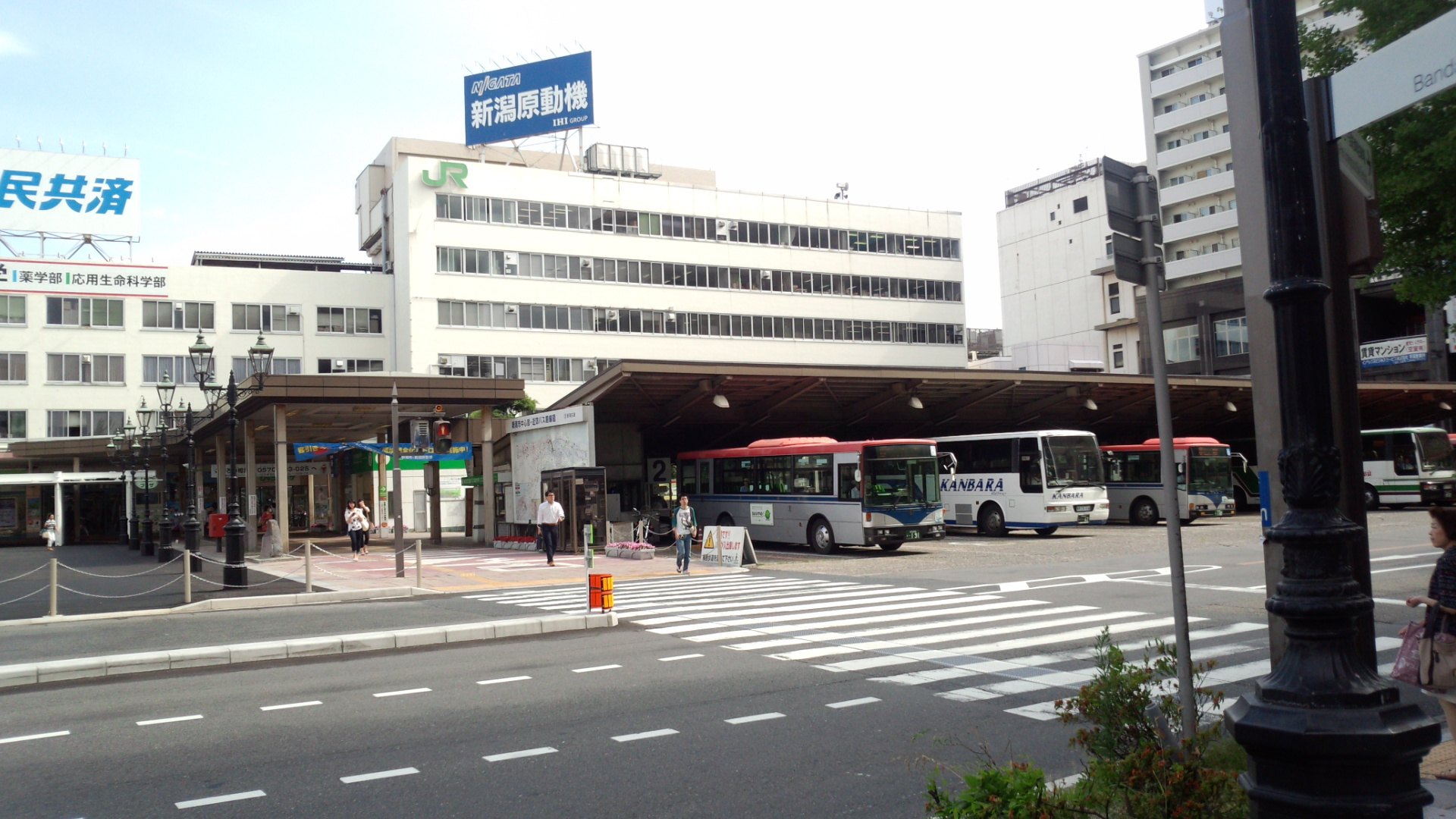 2015年6月18日撮影